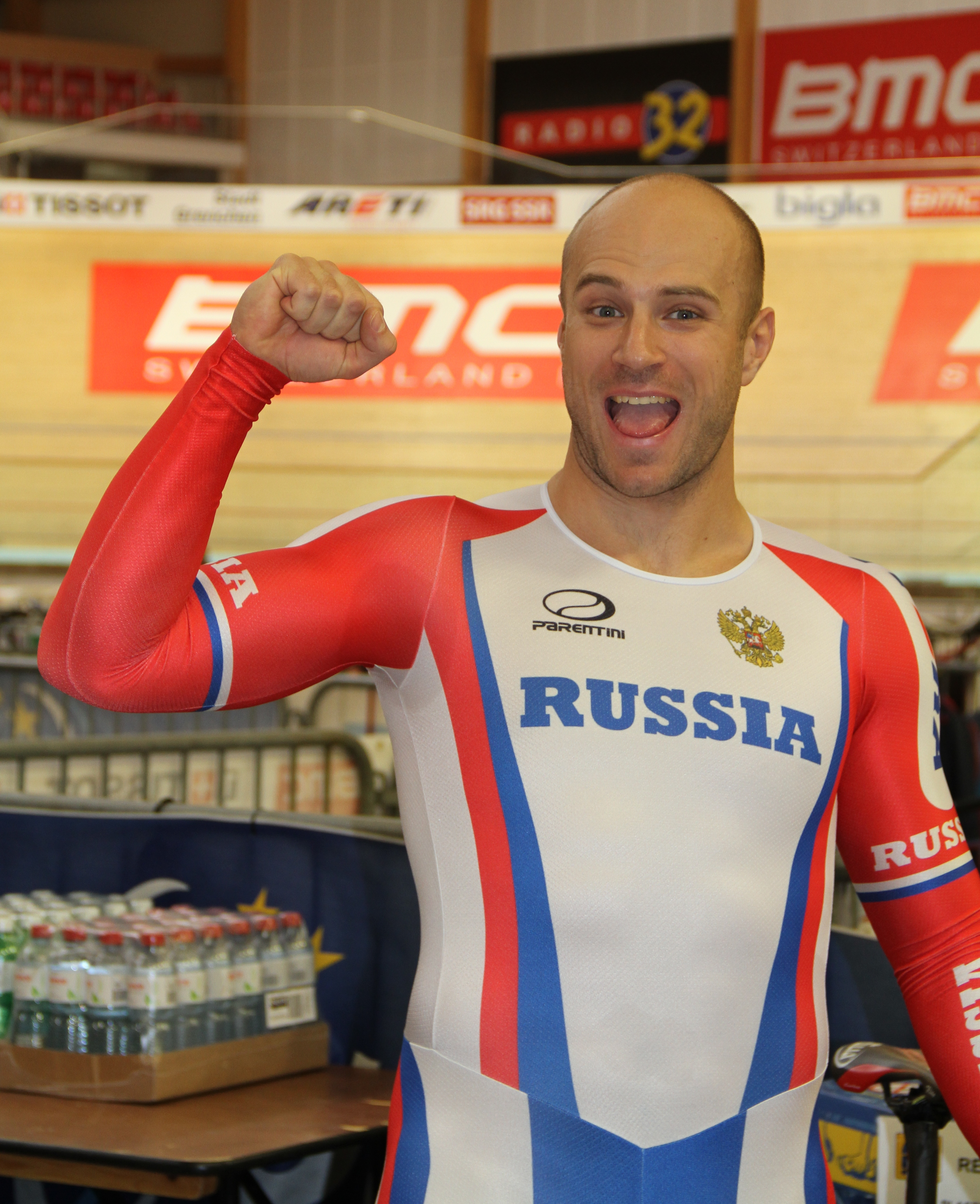 Denis Dmitriev, russischer Radsportler The making of this document was supported by the Community-Budget of Wikimedia Germany.